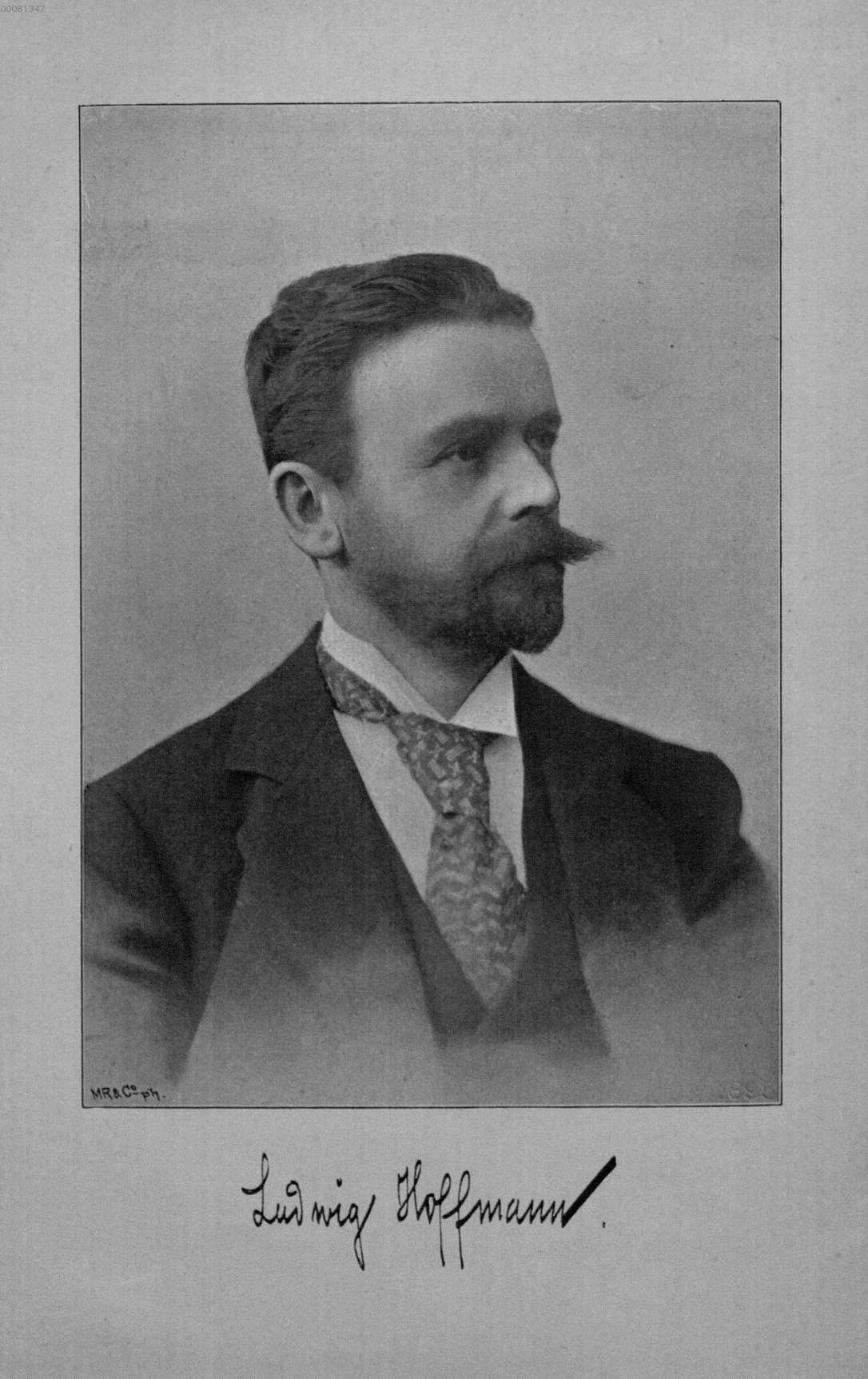 Ludwig Hoffmann, deutscher Architekt Erbauer des Reichsgerichtsgebäudes in Leipzig (zusammen mit Peter Dybwad